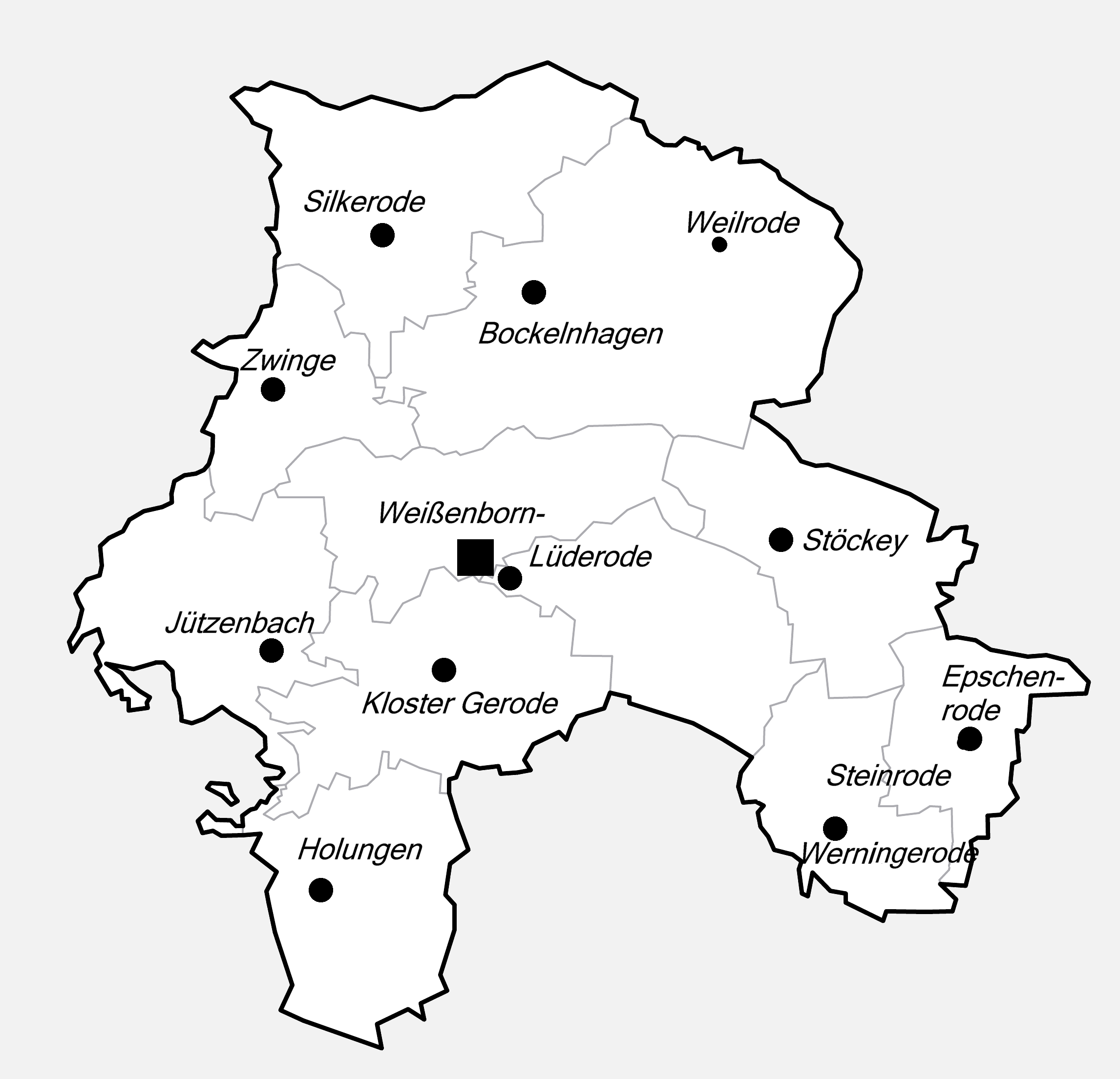 District-Map of Sonnenstein